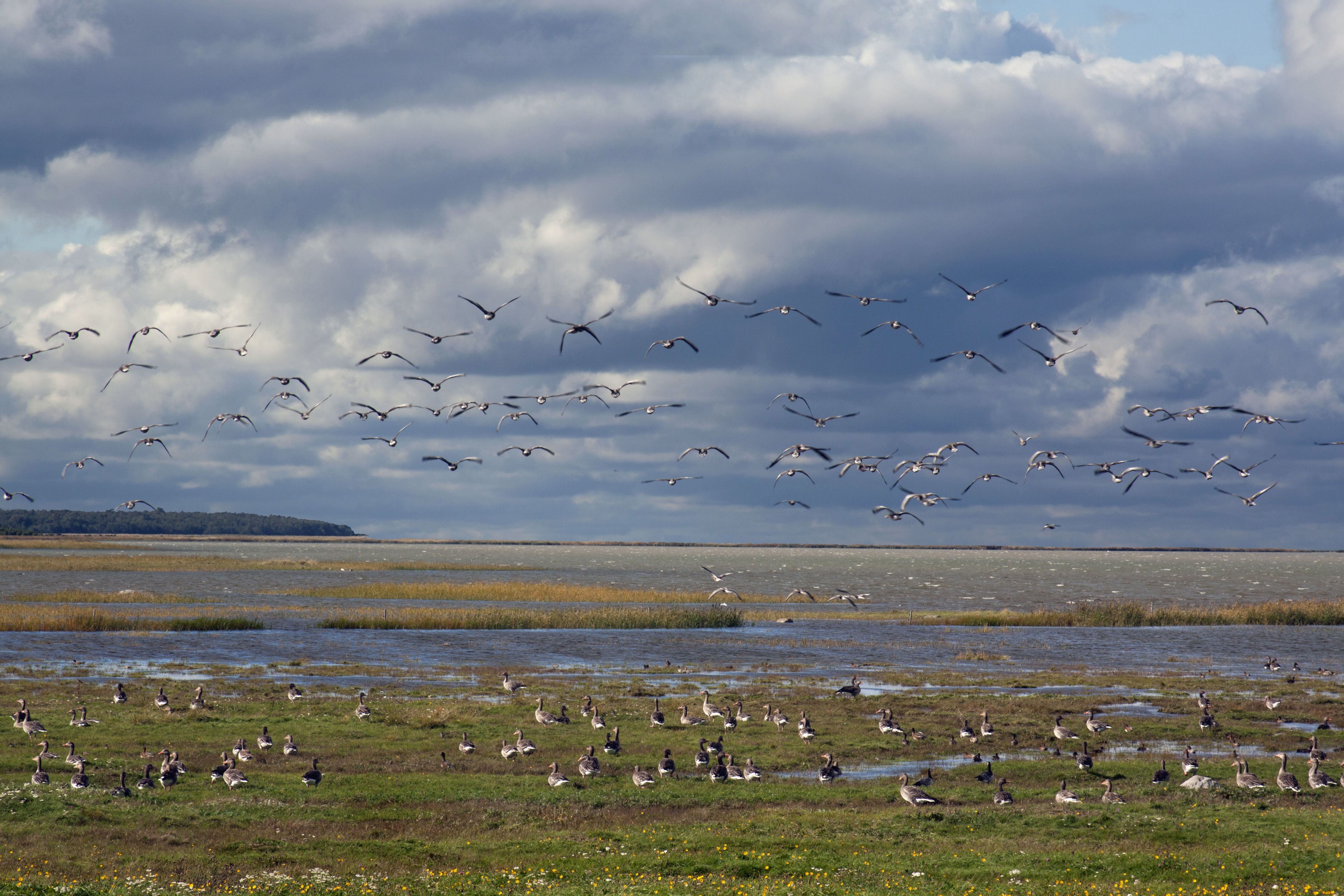 Hanede ränd Sassi poolsaarel